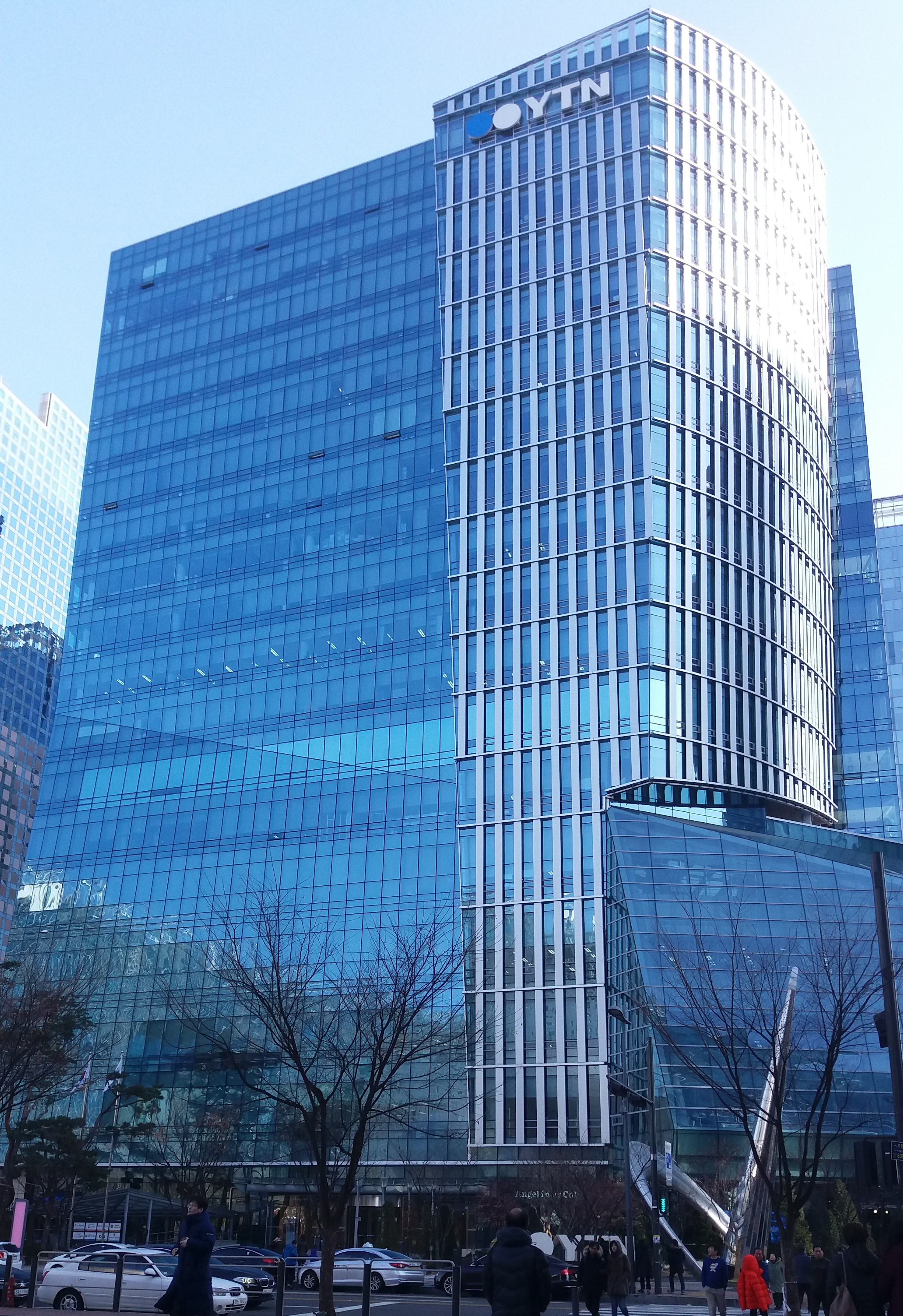 YTN 뉴스퀘어